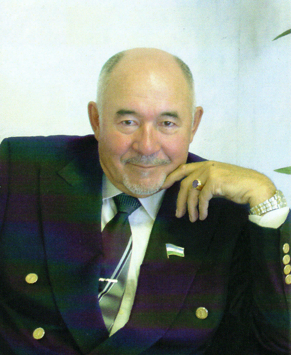 Сахаутдинов Венер Газизович (род. 1 января 1939, д. Кинзябаево, БАССР) — хирург, член-корреспондент АН РБ (1995), доктор медицинских наук (1975), профессор (1975), Ректор БГМУ (1982-1988), заслуженный деятель науки РФ (1990), БАССР (1983), заслуженный врач РБ (1993), изобретатель СССР, отличник здравоохранения России (1991). Депутат Государственного Собрания (1995).